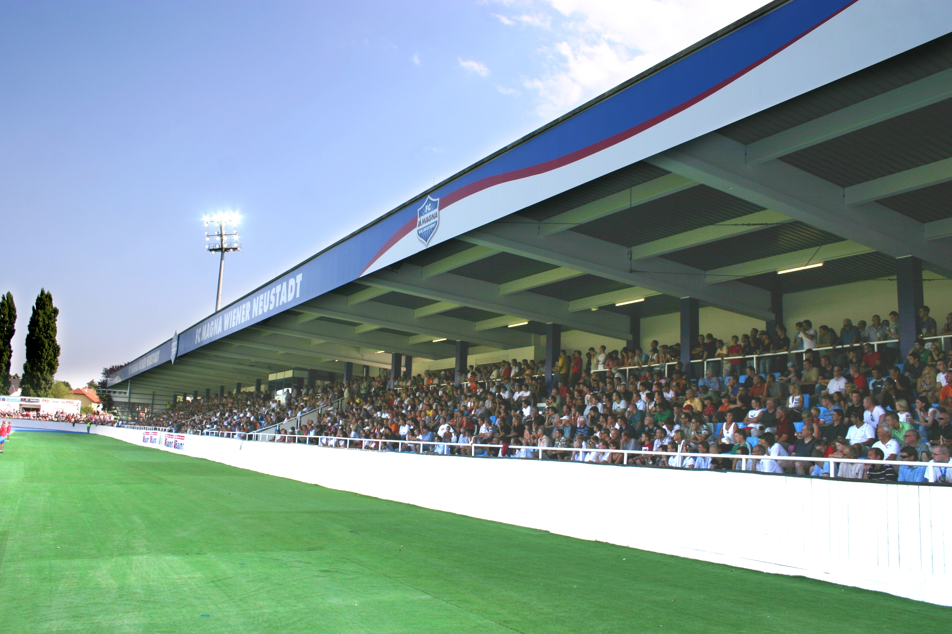 Stadion Wiener Neustadt nach den Umbauten 2008 zur „Magna Arena“